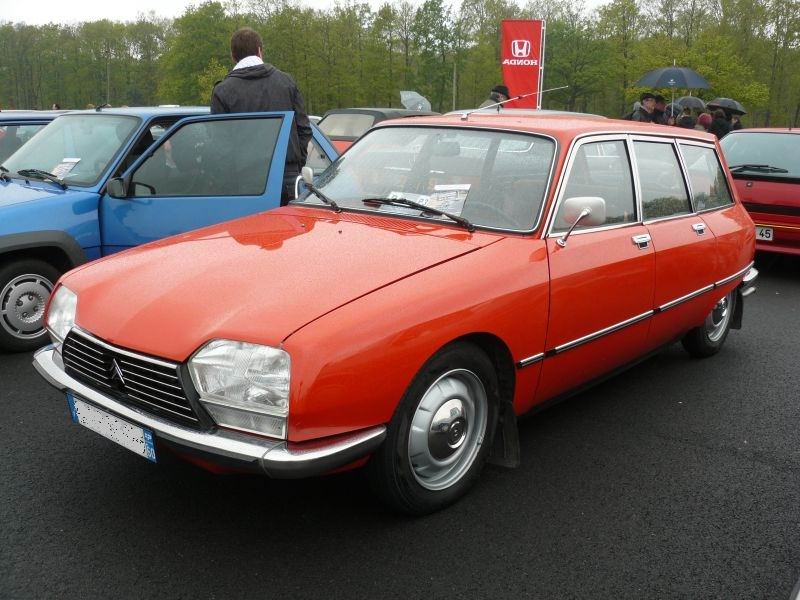 Photo prise en avril 2012 à Montlhery